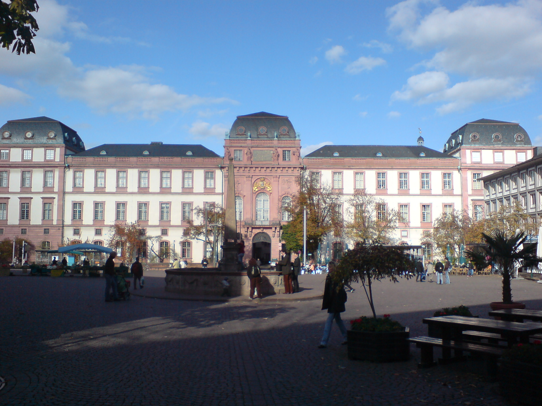 Schloß (TU Darmstadt)